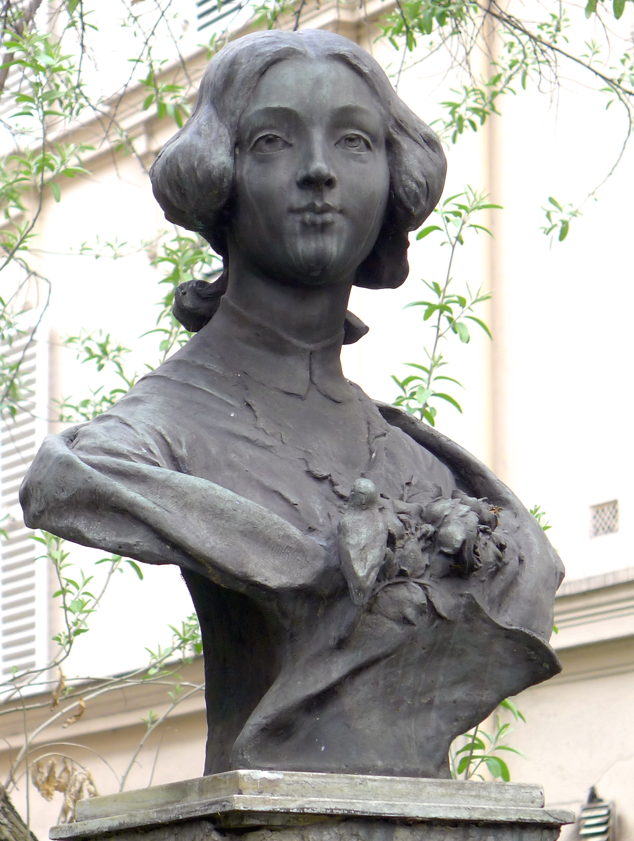 Buste en bronze de Clotilde de Vaux par Décio Villarès (1851-1931), rue Clotilde de Vaux (boulevard Baumarchais), Paris (11e arrond).